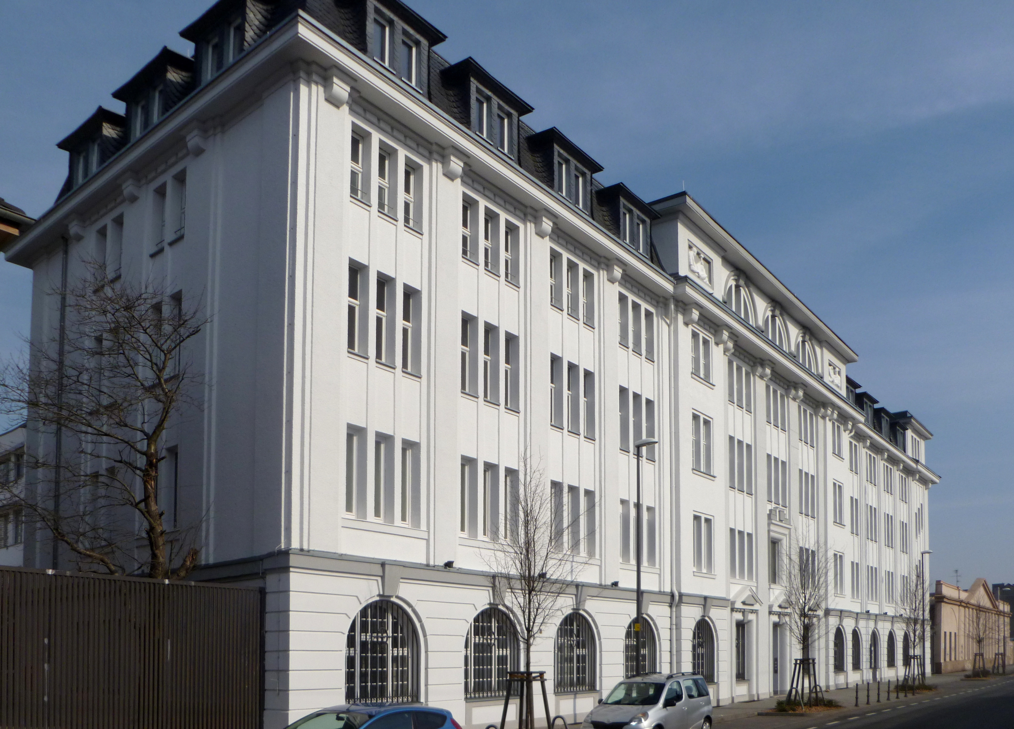 Haus der Integration und Identität, Reichsweg 30, 52068 Aachen-Forst. Ehemaliges Verwaltungs- und Produktionsgebäude der Nadelfabrik Rheinnadel. Heute Sitz des Aachener Stadtarchivs und Sitz von 13 weiteren Firmen und Institutionen (Stadtteilbüro Aachen-Ost, Integrationsrat der Stadt Aachen, StadtSportBund, Aachener Wirbelsturm gegen Gewalt, Boxgym, TÜV Nord Bildung, Werkstatt der Kulturen, Sozialraumteam II u.a.). Die Eröffnung nach 5-jährigem Umbau war am 12. April 2013